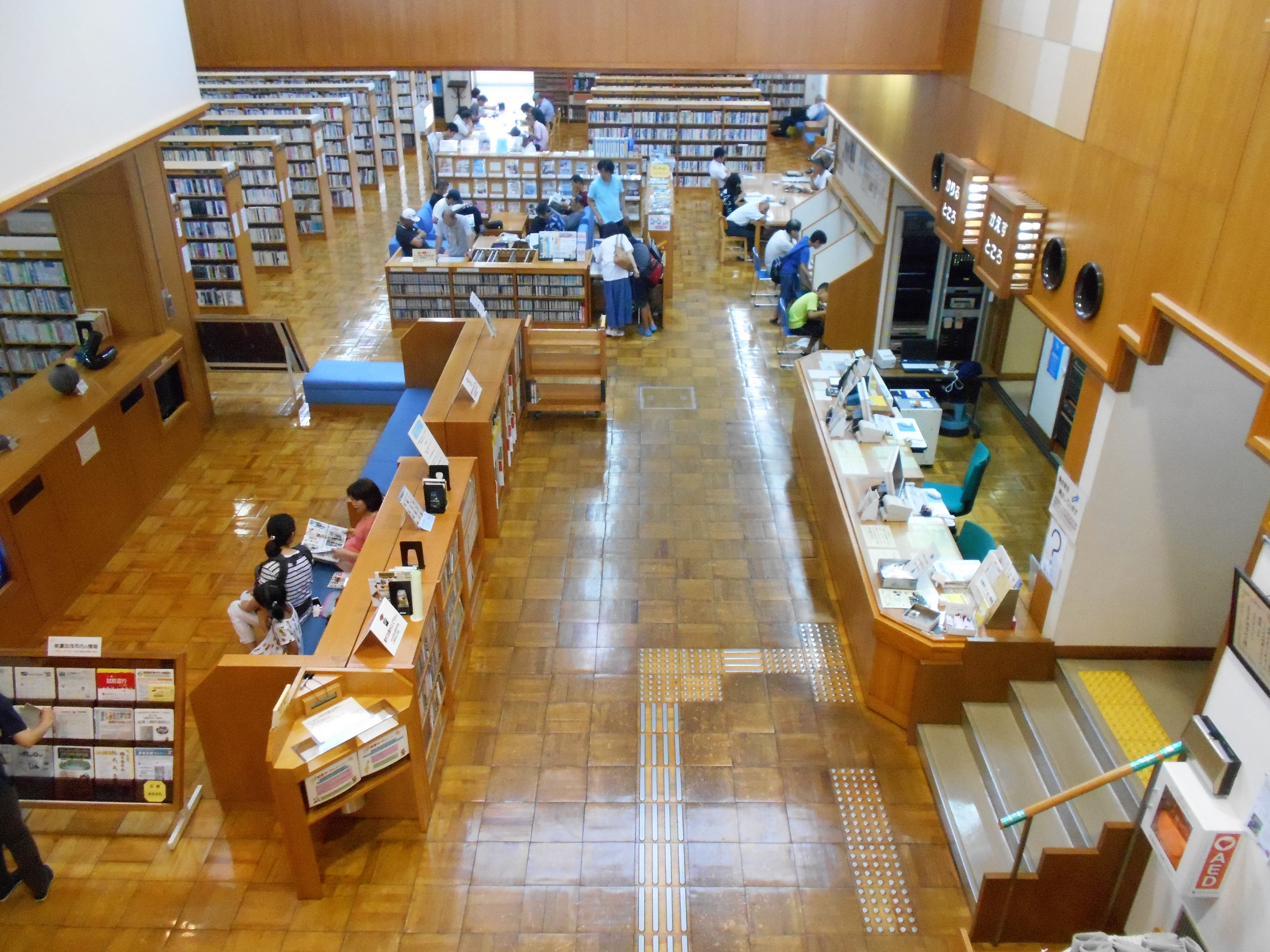 美濃加茂市中央図書館。カウンター（右）とAVコーナー（左）。